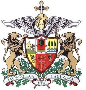 Escudo de Jaungoikua eta Lagizarra